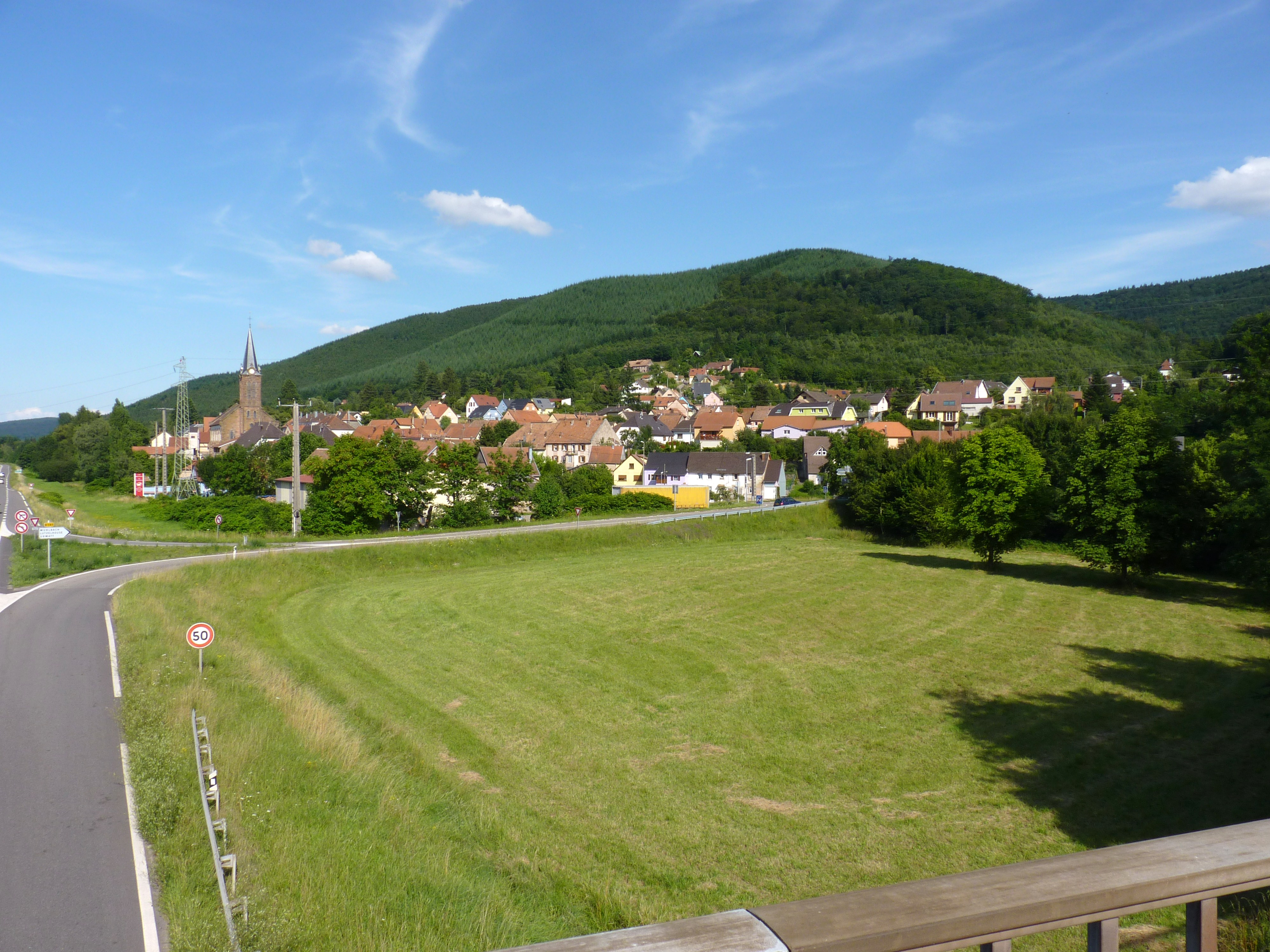 Vue sur le village de Muhlbach-sur-Bruche